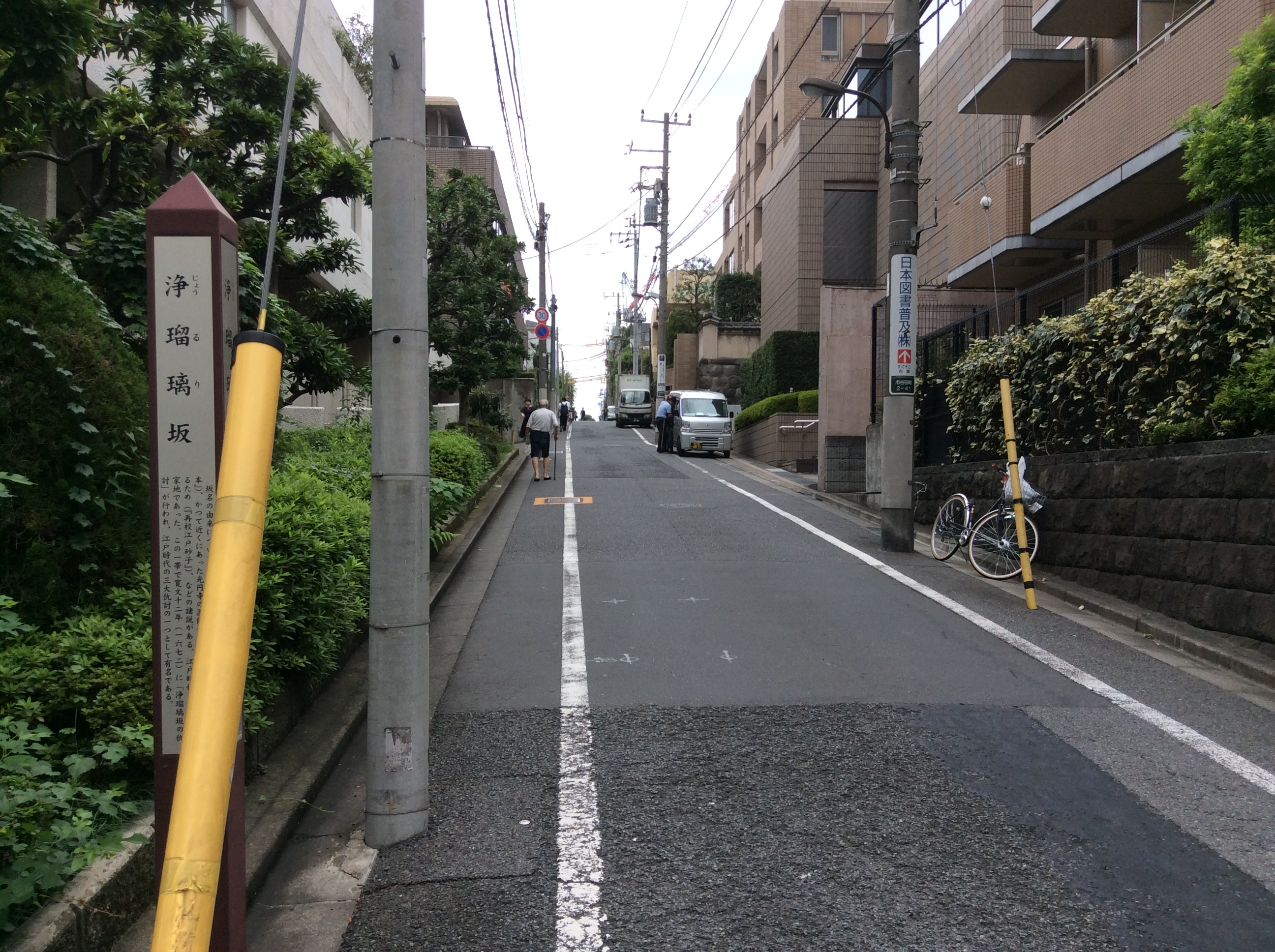 市谷 浄瑠璃坂